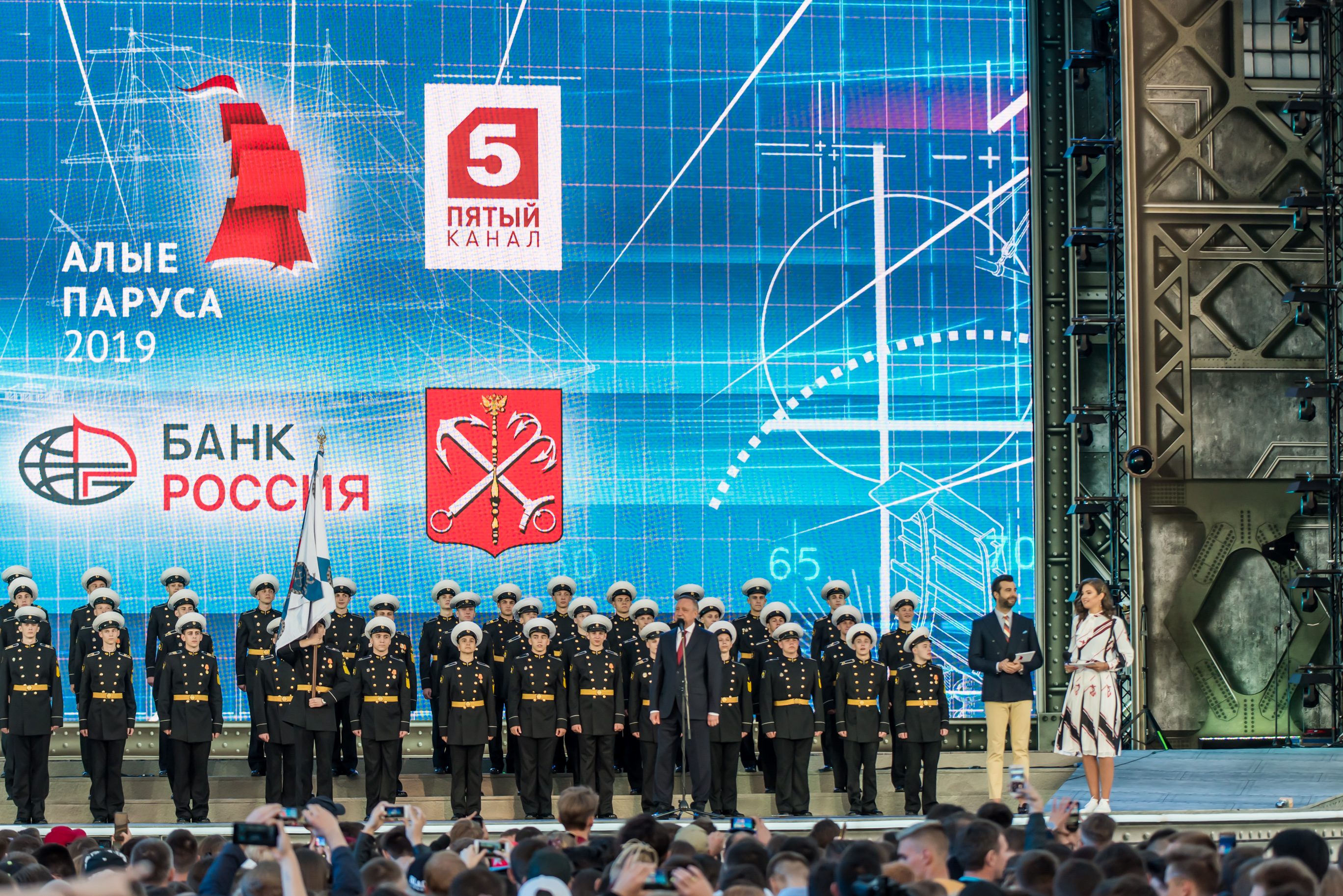 Алые Паруса 2019. Приветственная речь Александра Беглова